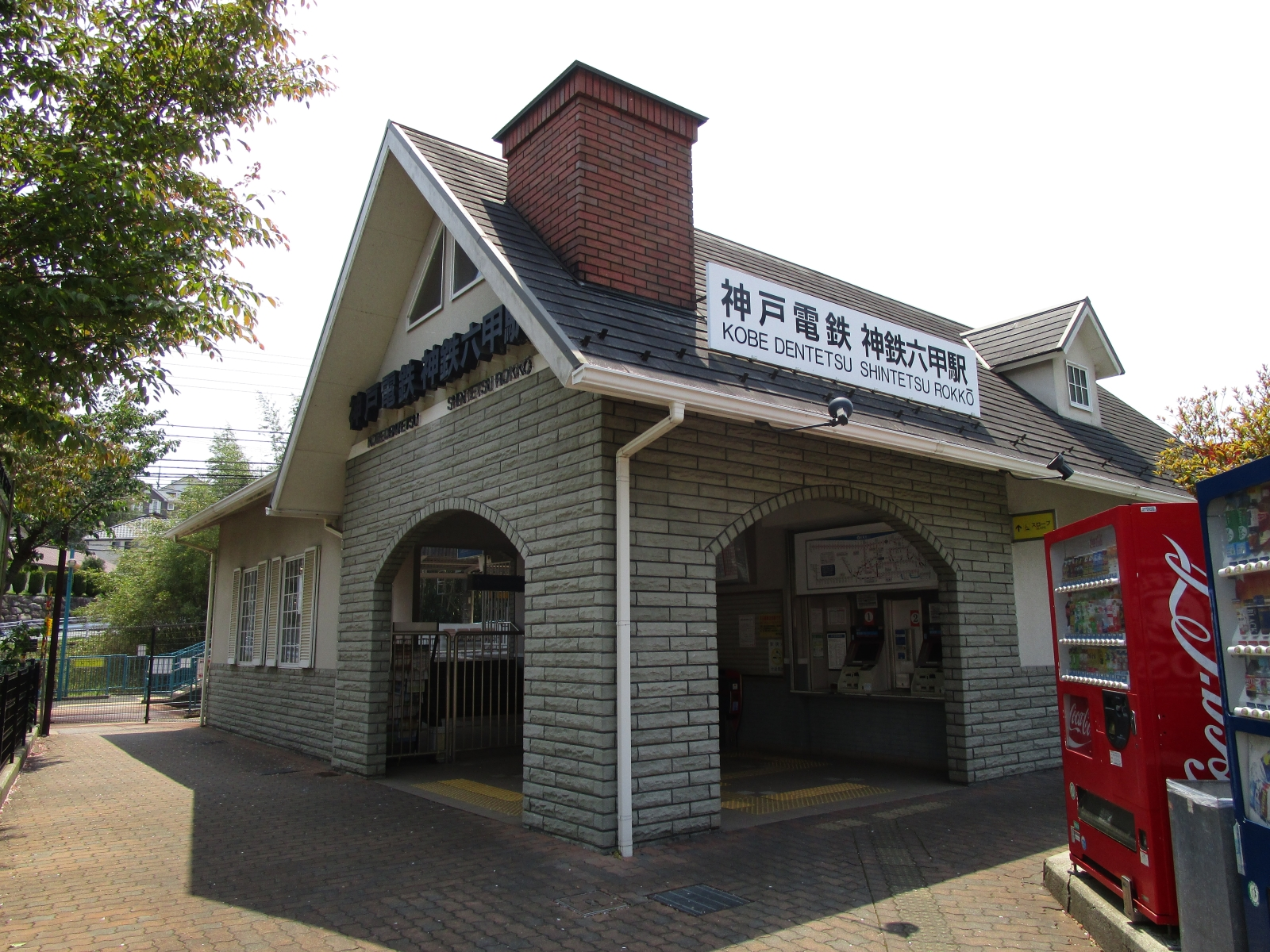 神鉄六甲駅入り口